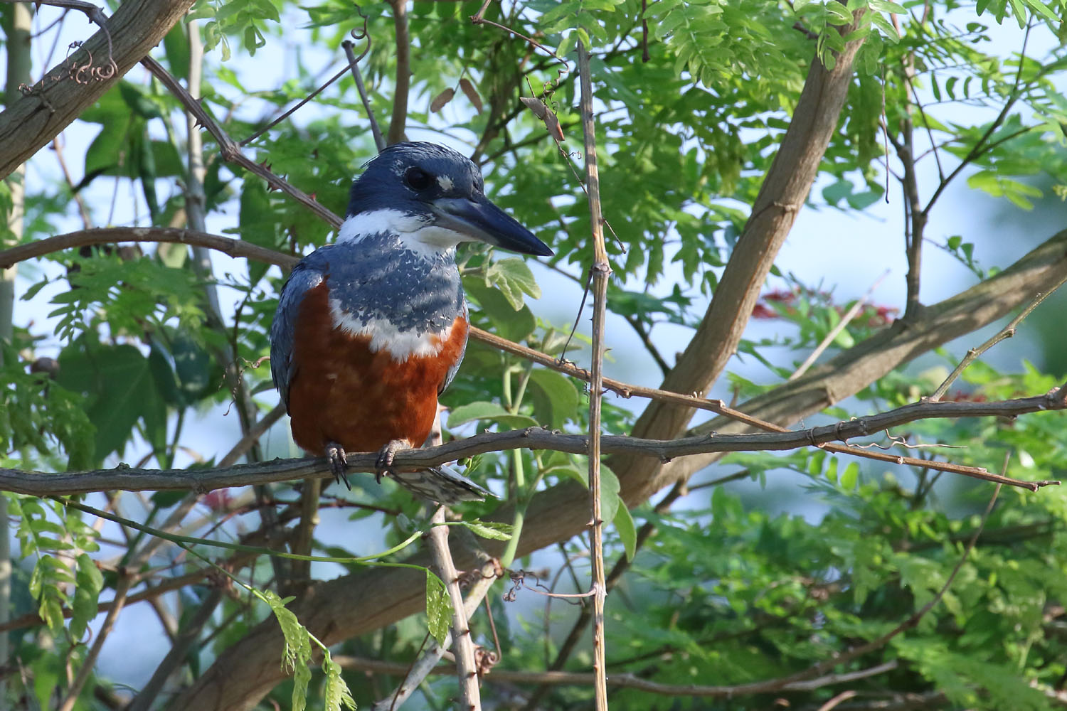 Martin-pêcheur à ventre roux (femelle), Pantanal (Brésil)